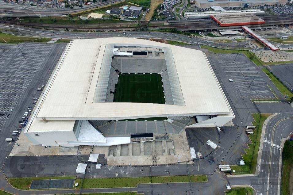 Vista aérea da Arena Corinthians, em Itaquera, na Zona Leste da capital paulista